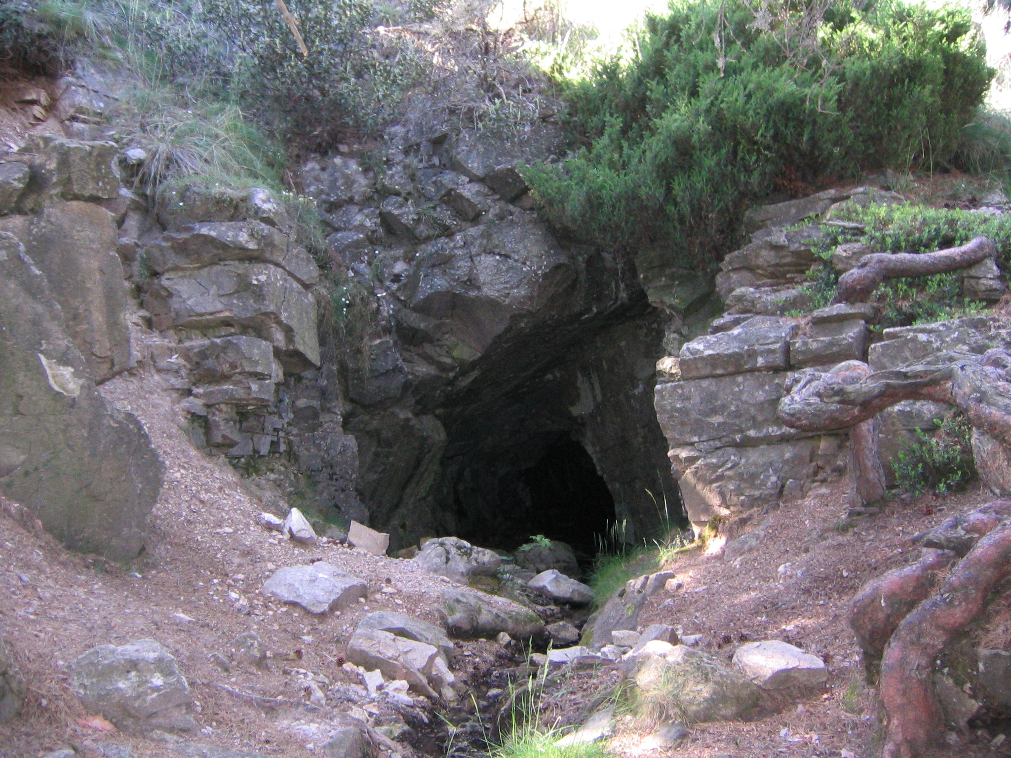 Bocamina de explotación minera "La Primera" en el monte Cabeza Líjar en la sierra de Guadarrama (España).